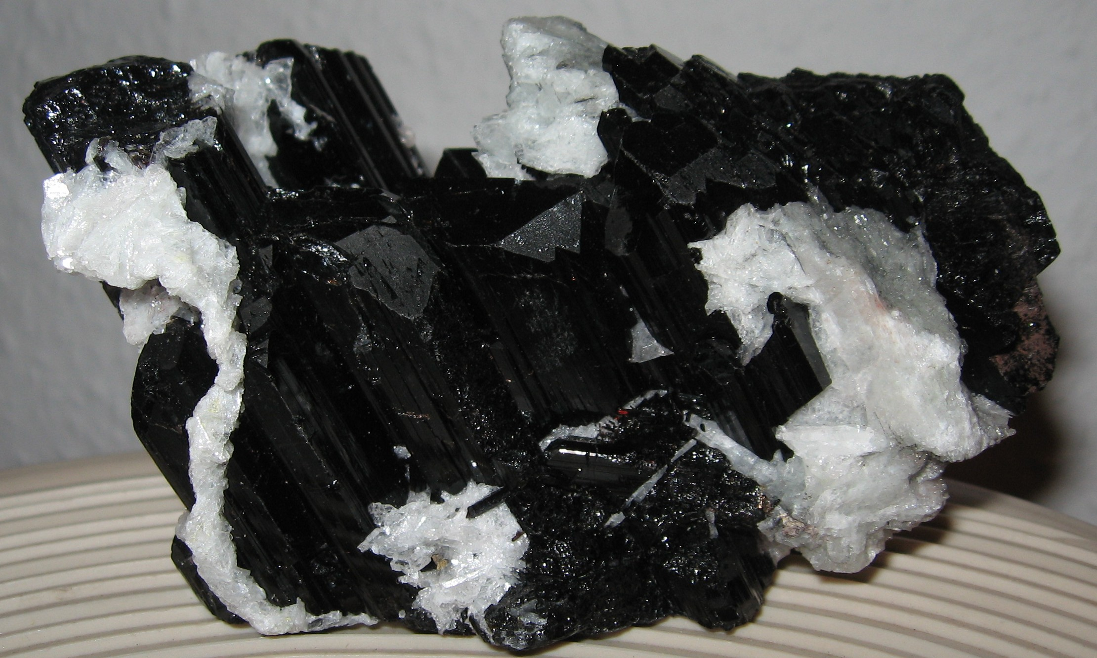 Schörl (schwarzer Turmalin) mit Cleavelandit aus Ibadan/Nigeria